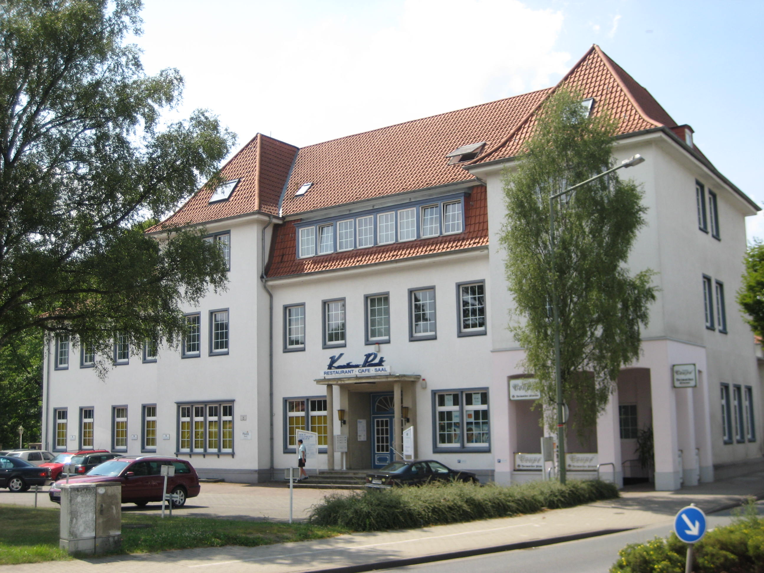 ehemaliges Kasino des Georgs-Marien-Bergwerks- und Hüttenvereins in Georgsmarienhütte